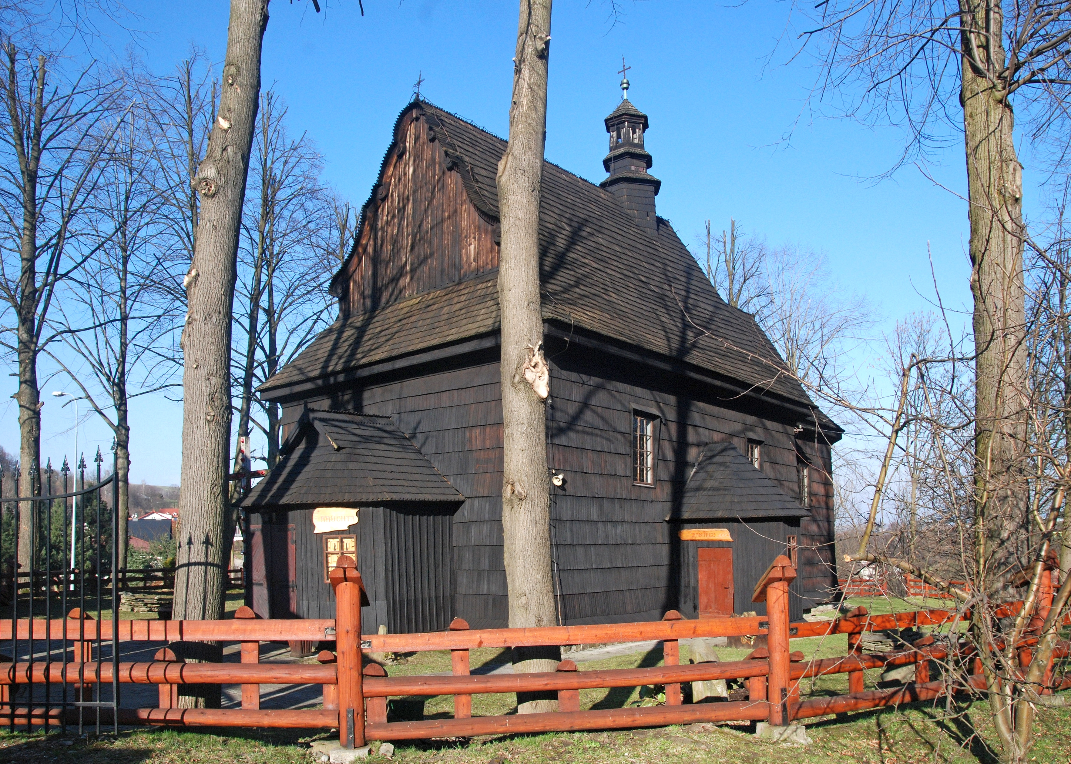 wieś Szymbark (województwo małopolskie)